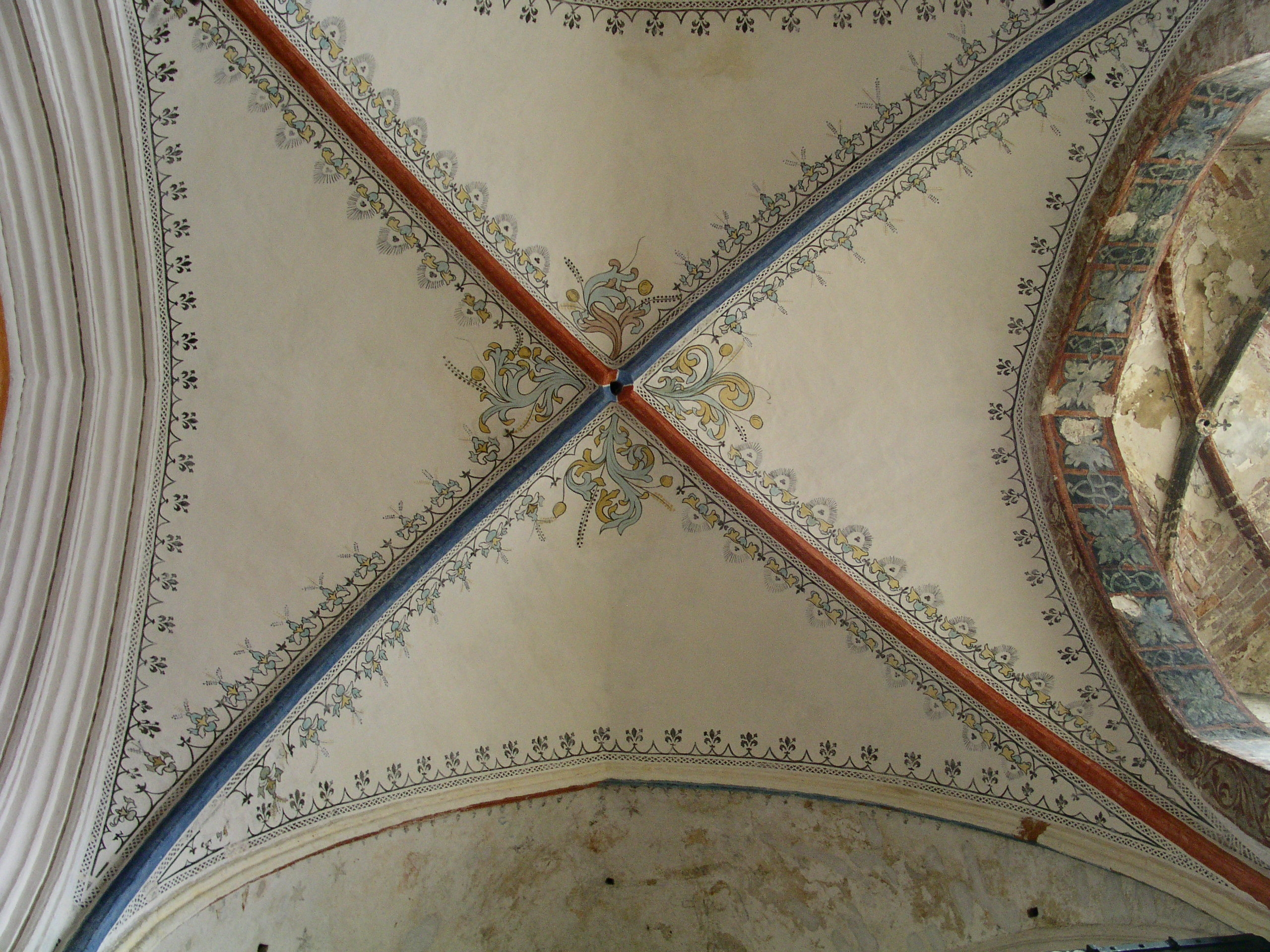 Ausgemaltes Kreuzrippengewölbe in St. Nicolai Stralsund